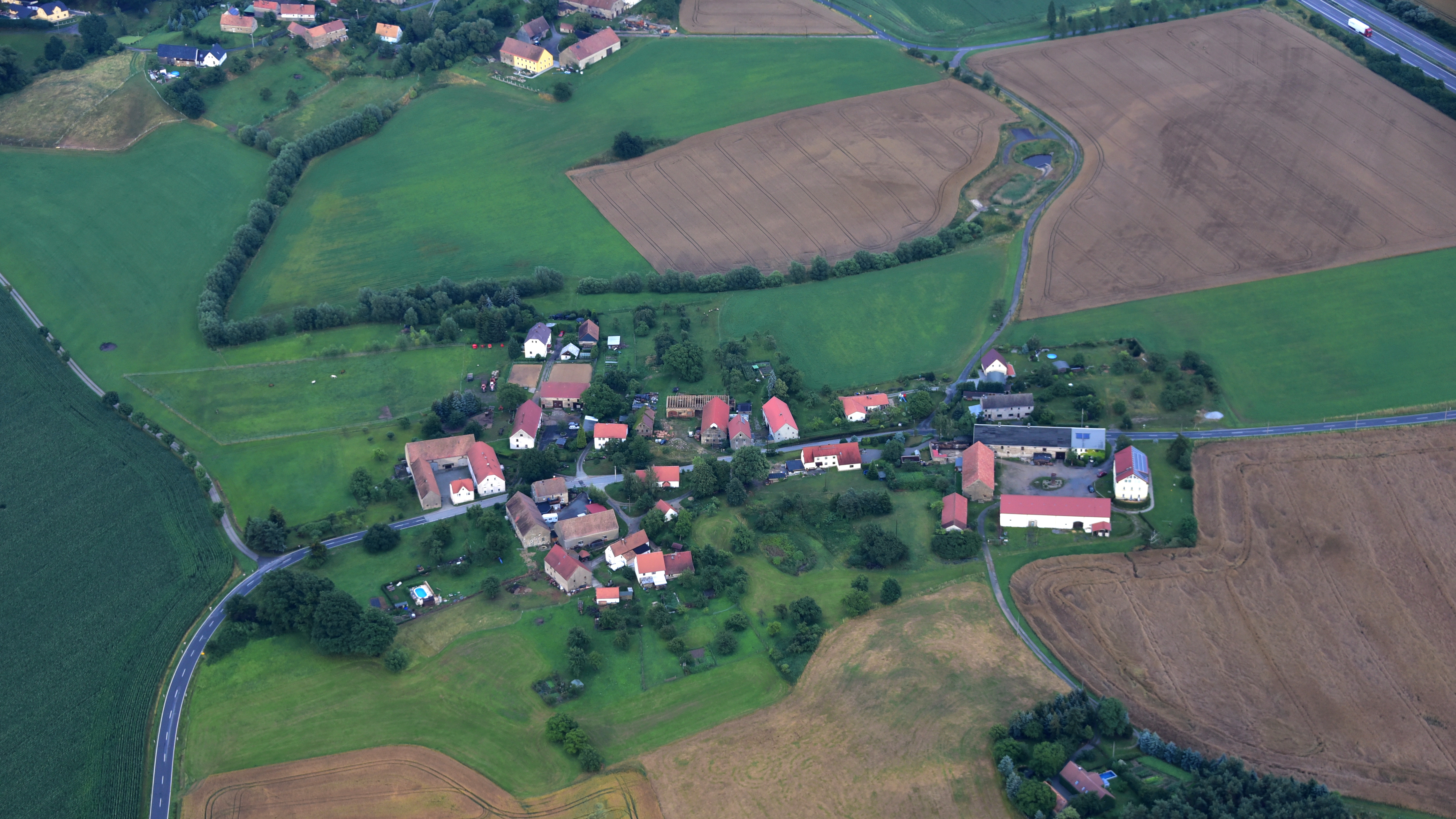 Brießnitz (Malschwitz), Luftaufnahme (2017) Hornjoserbsce: Powětrowy wobraz Brězec pola Barta (2017)